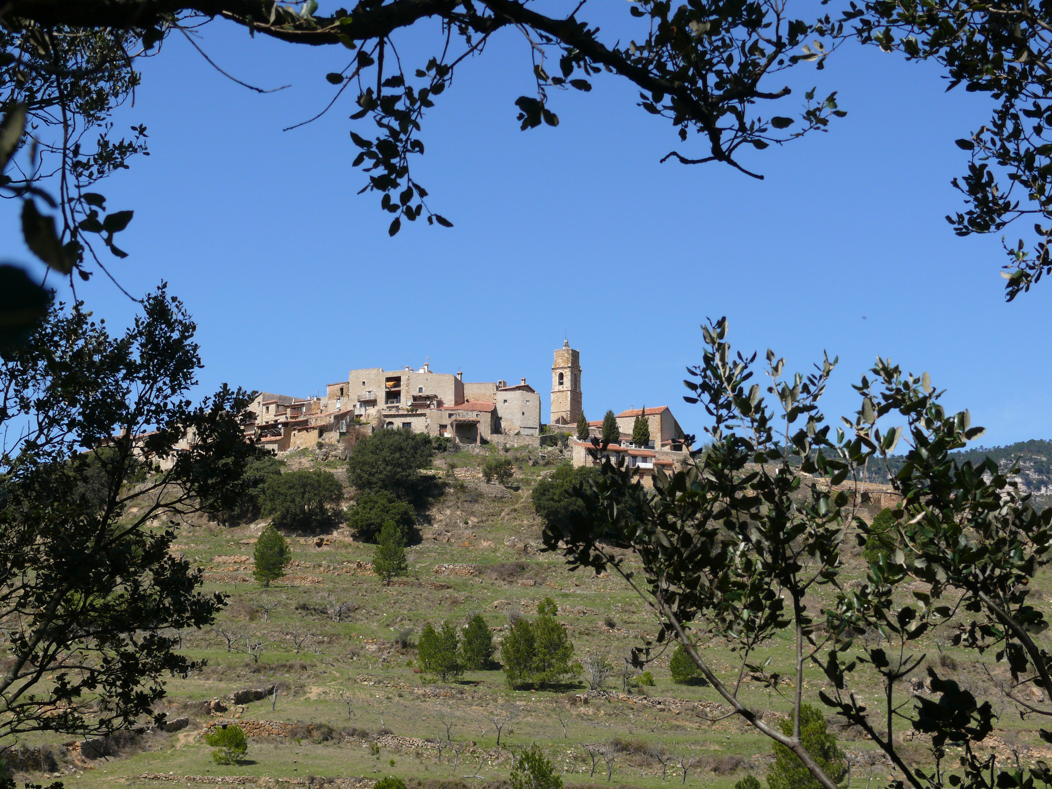 Parc Natural de la Tinença de Benifassà This is a a photo of a natural area in the Land of Valencia, Spain, with id: ES520047